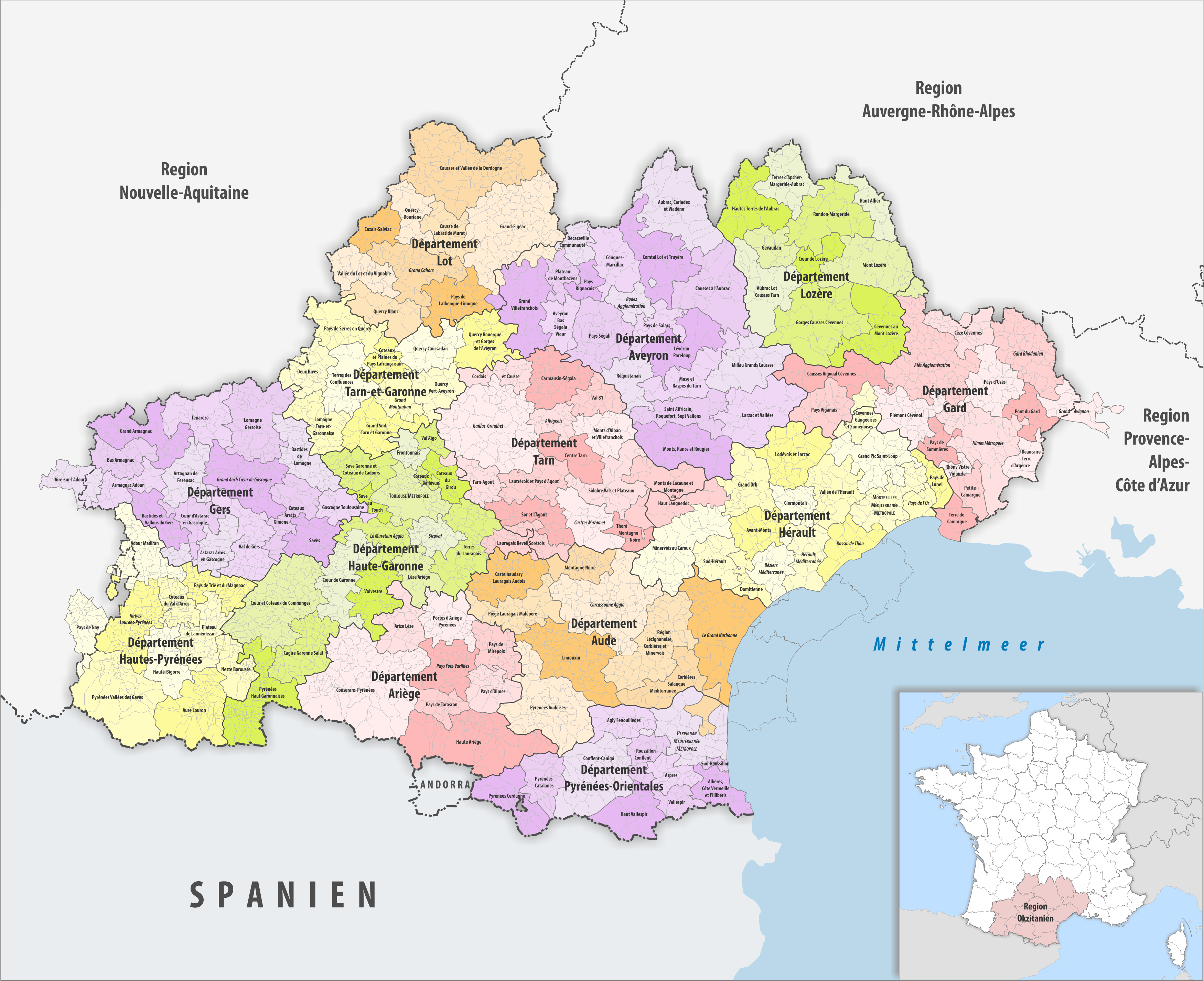 Gemeinden, Gemeindeverbände und Départemente in der Region Okzitanien